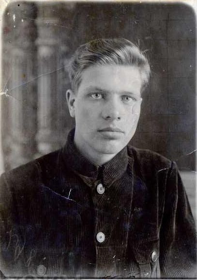 Николай Фёдорович Шутов, советский лётчик истребитель. таранивший немецкий разведывательный Юнкерс